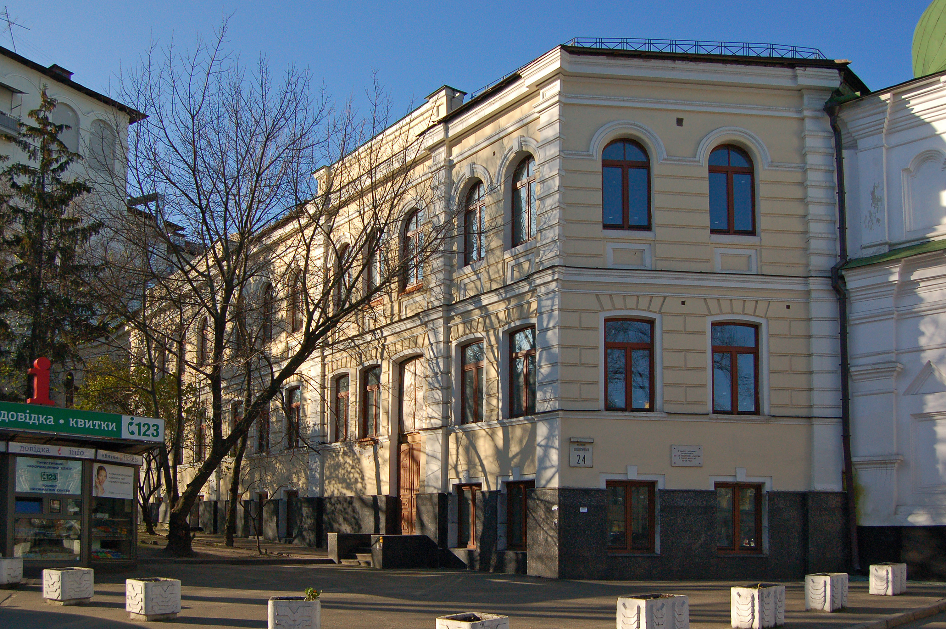 Будинок № 24 по Володимирський вулиці у Києві, в якому знаходився штаб оборони міста у 1941 р.